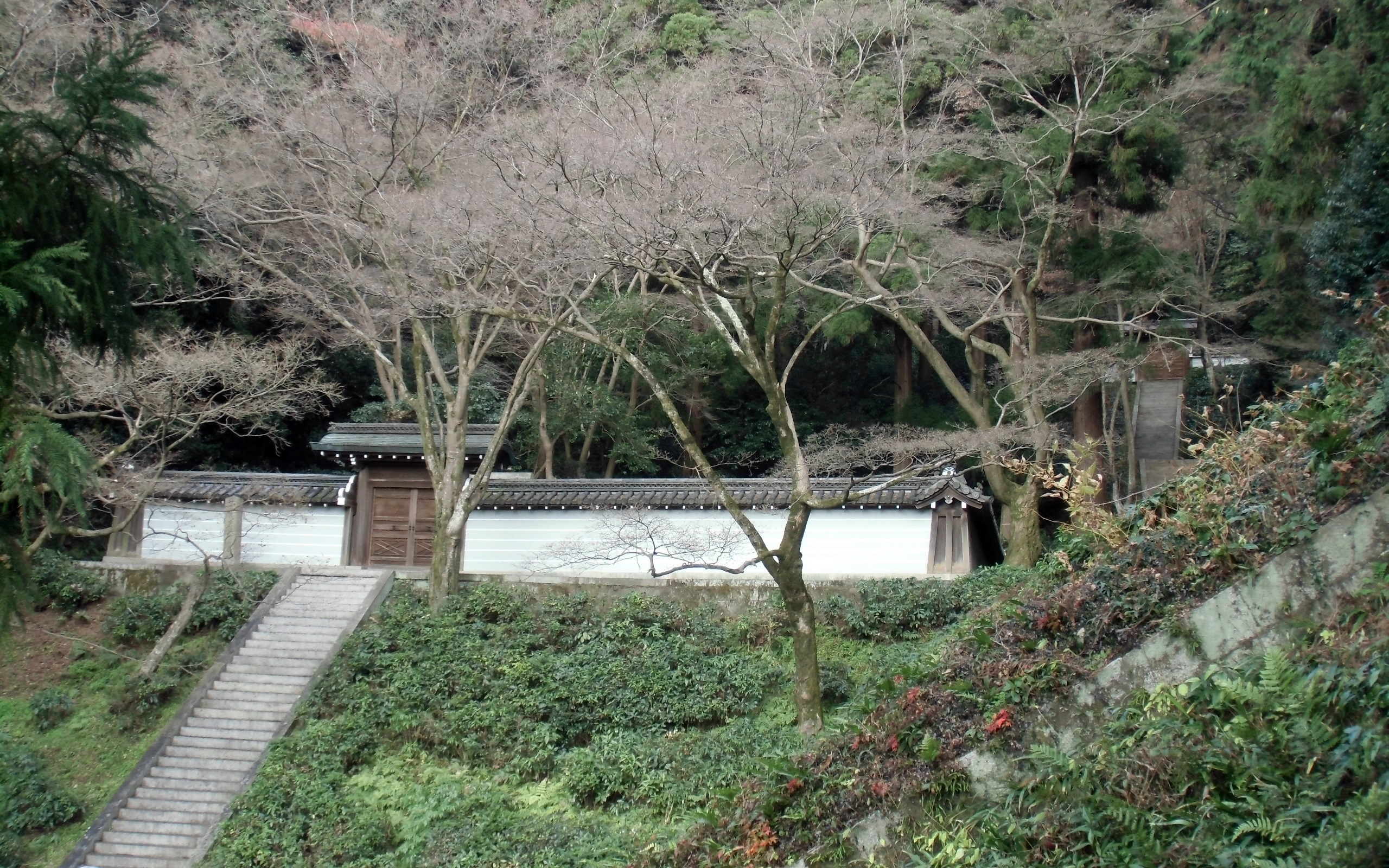 高倉天皇陵（左側）及び六條天皇陵への参道